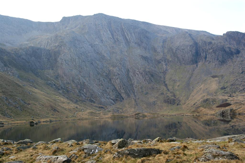 Llyn Idwal, Eryri/Snowdonia